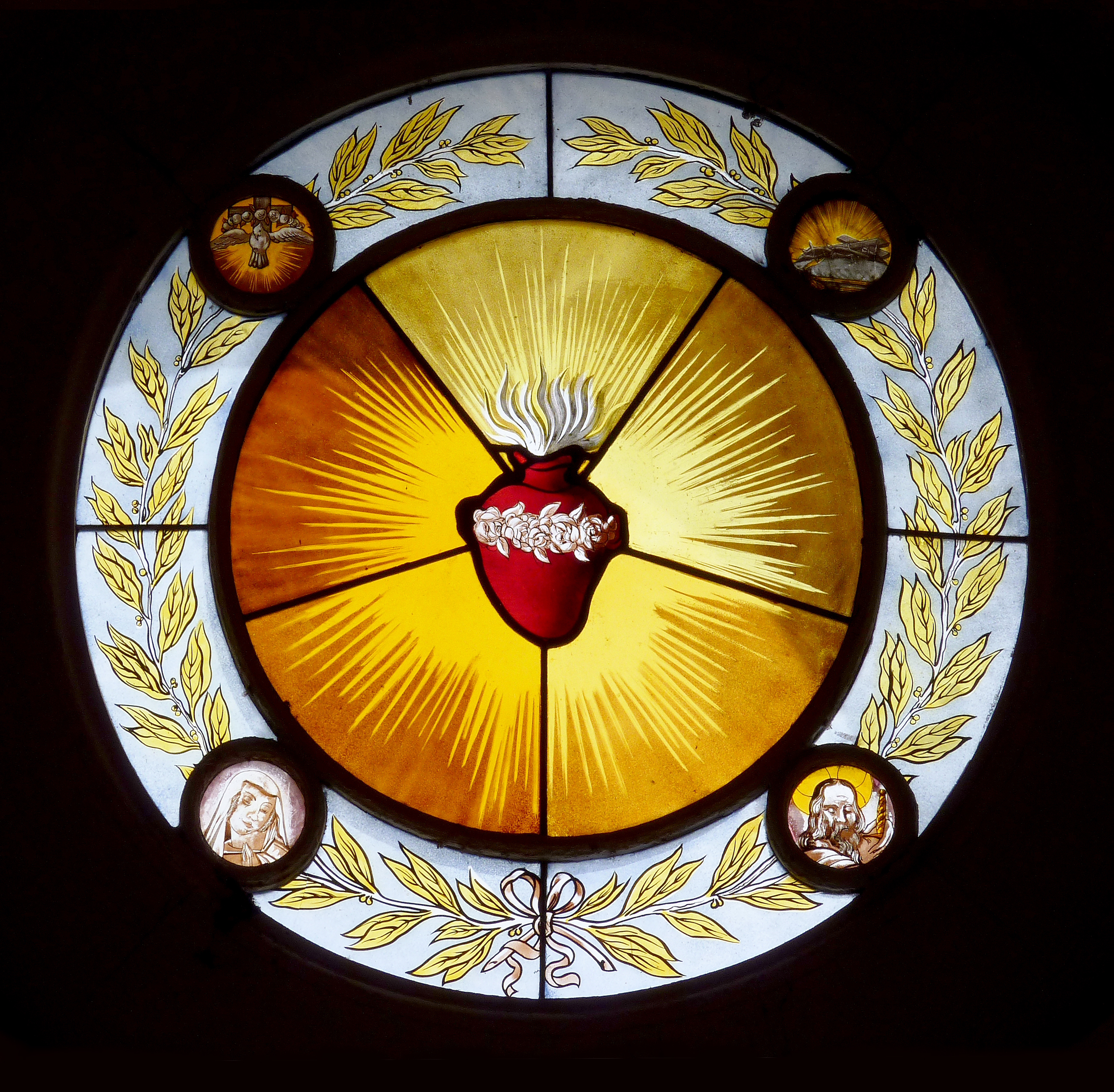 Bleiglasfenster am Eingang der Congrégation des Soeurs Augustines du Saint-Coeur de Marie, 29, rue de la Santé im 13. Arrondissement in Paris; Darstellung: Herz Jesu